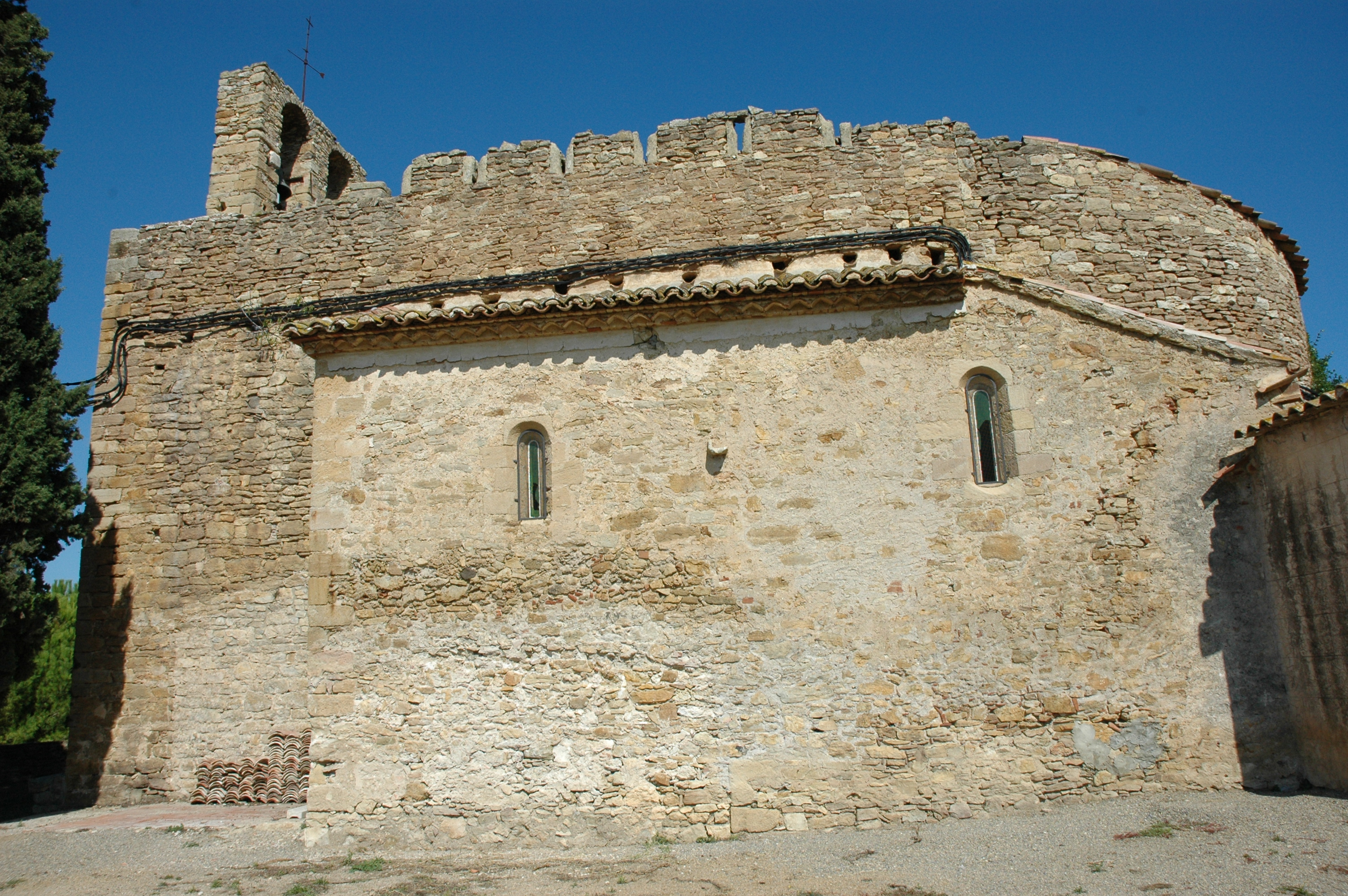 Sant Pere de Palau-sator